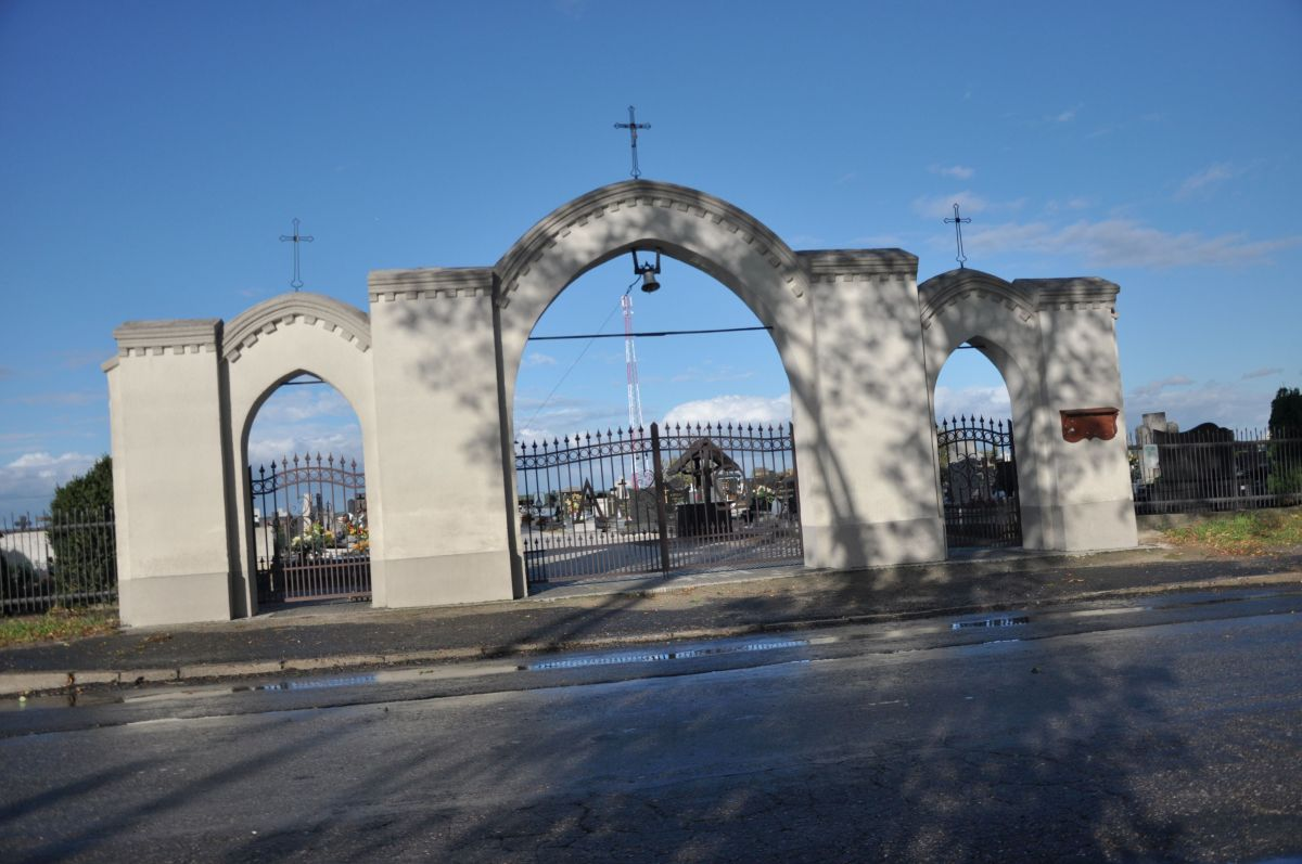 Widok bramy cmentarnej, Andrzejów 2018